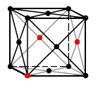 Bildbeschreibung: Austauschmischkristall kubischflächenzentriert Fotograf/Zeichner: Benutzer:Ra'ike Datum: 02.10.2005 andere Versionen: 1.0